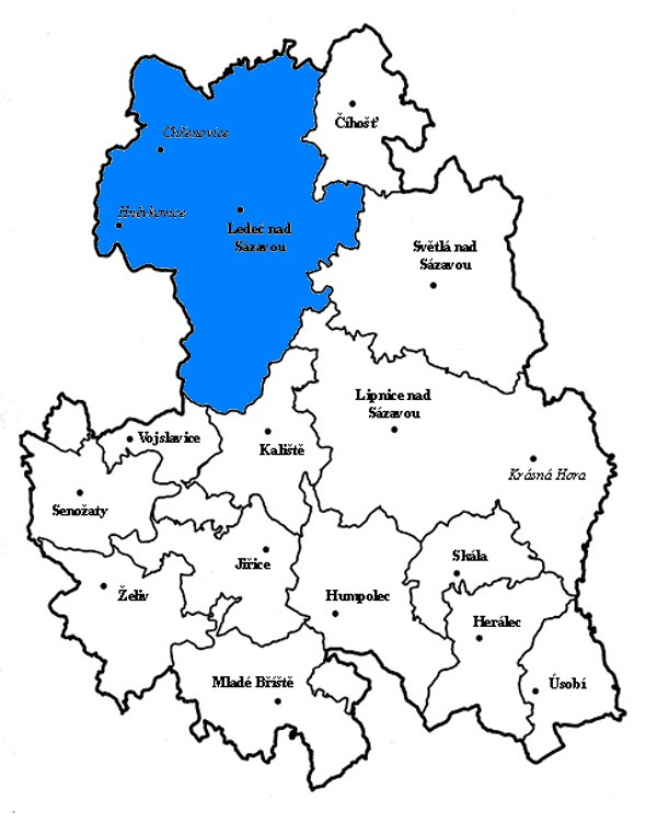 Římskokatolická farnost Ledeč nad Sázavou vyznačená na mapě humpoleckého vikariátu